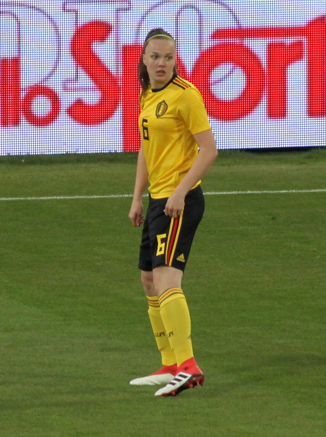 Tine De Caigny, attaccante della nazionale di calcio femminile del Belgio, durante l'incontro Italia-Belgio del 10 aprile 2018 allo stadio Paolo Mazza di Ferrara.